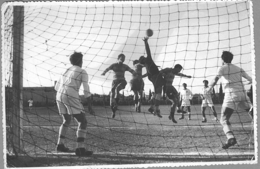 תמונה מארכיון של מנחם שירזי